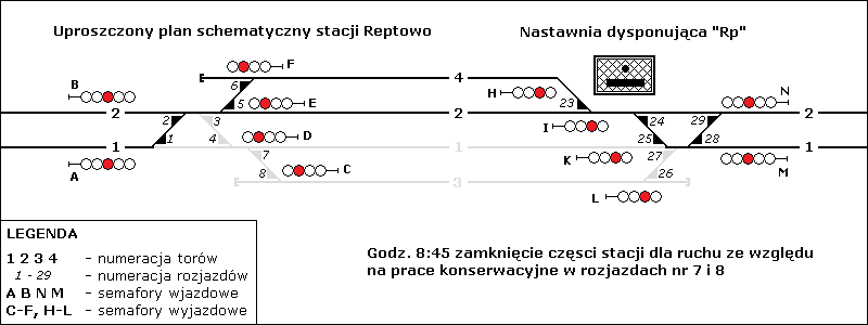 Stacja Reptowo 5 maja 1997, godz. 8:45 wyłączenie z ruchu części stacji ze względu na prace w rozjazdach nr 7 i 8